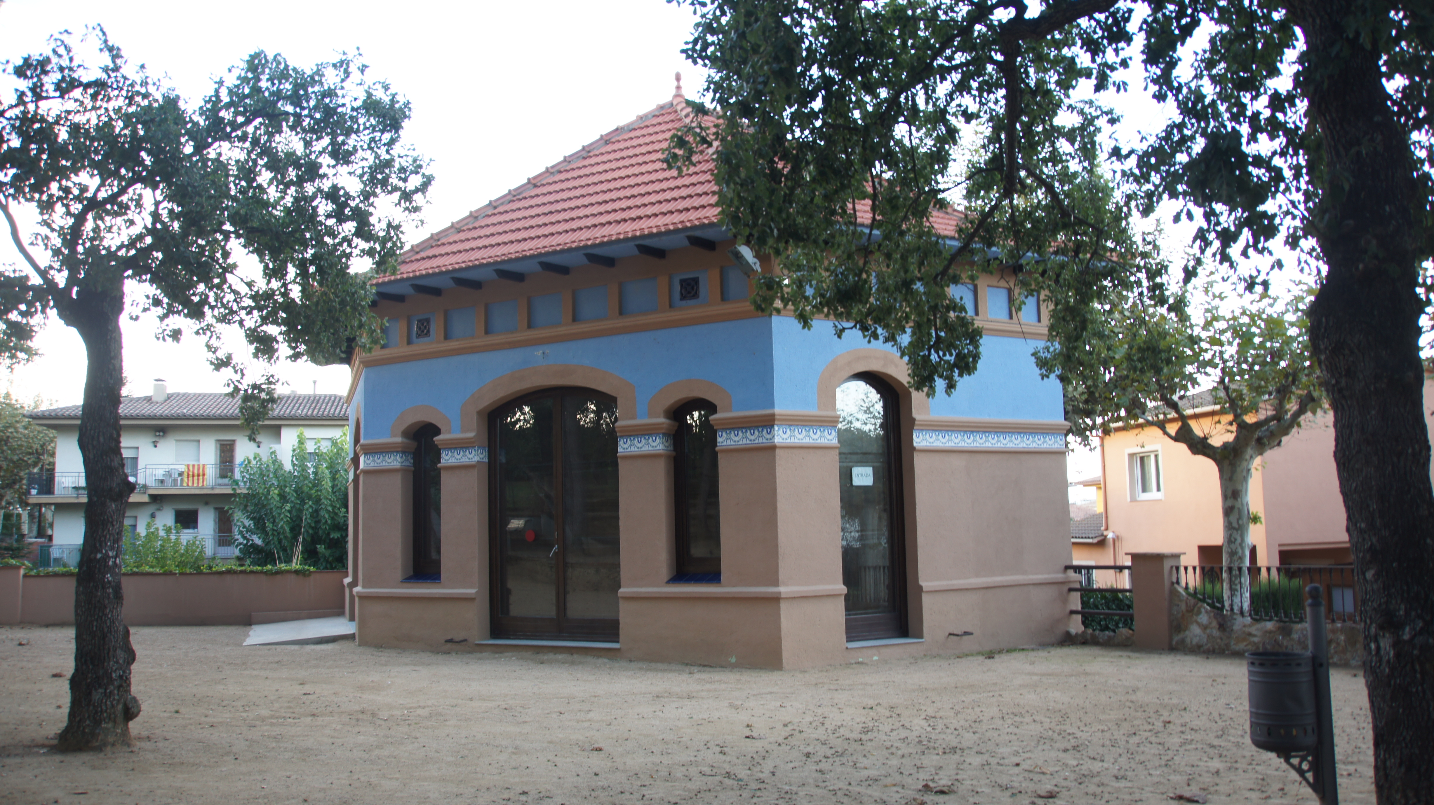 Malavella, Casinet